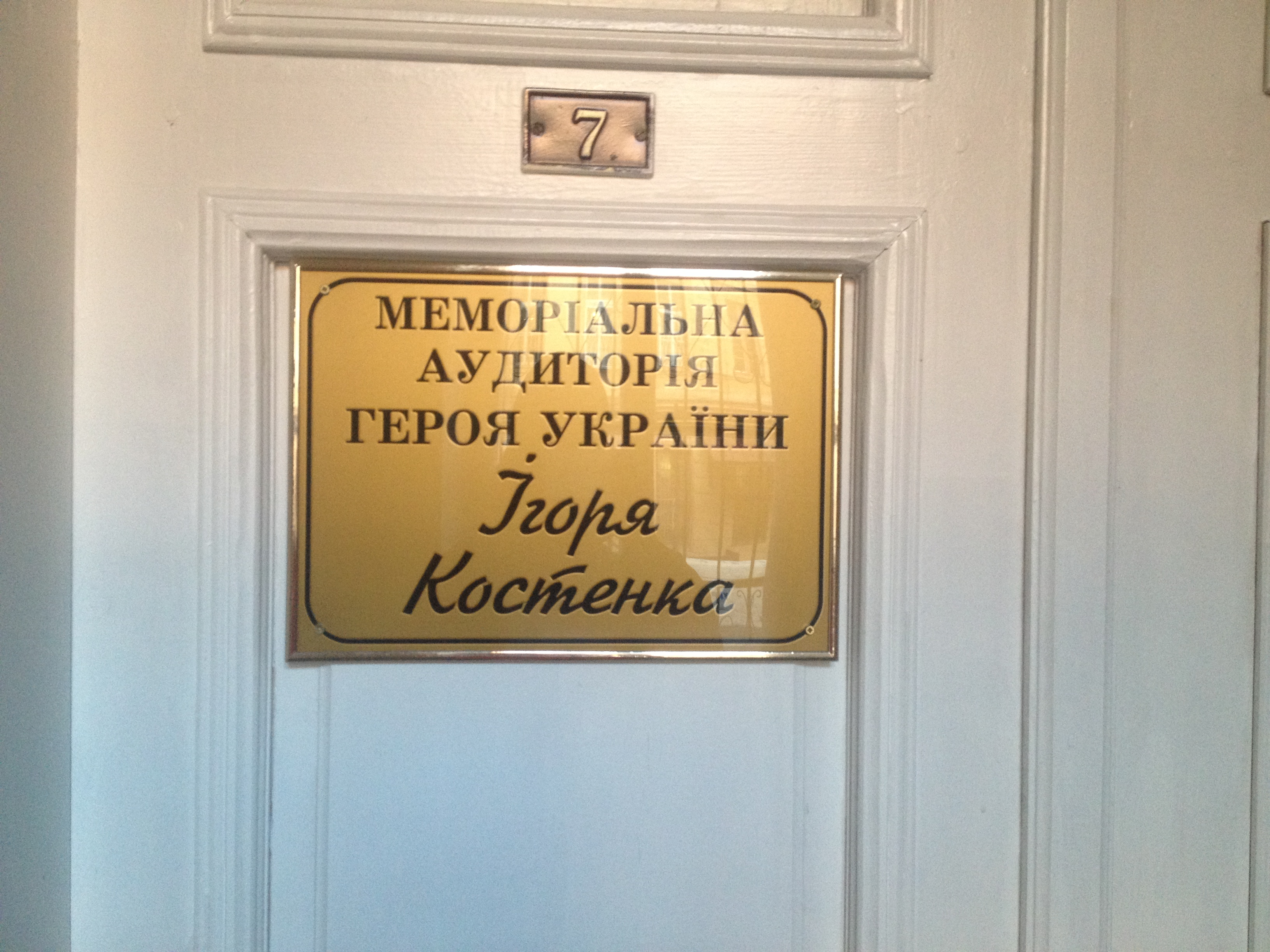 Меморіальна аудиторія на географічному факультеті ЛНУ ім. І.Франка